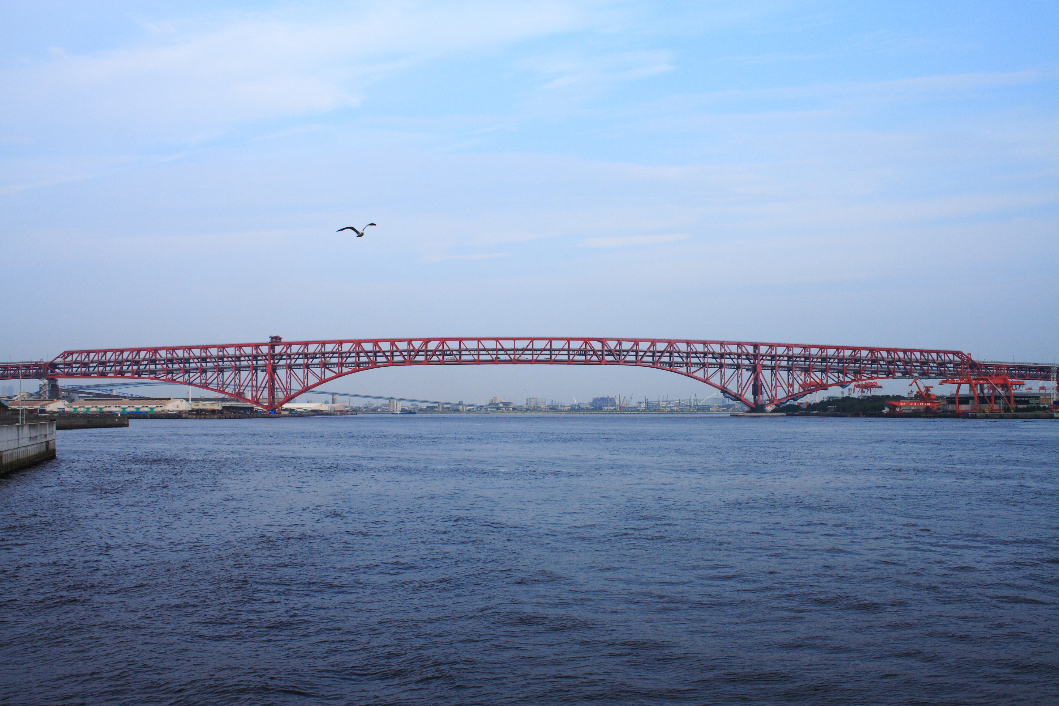 Minato Ohashi / 港大橋